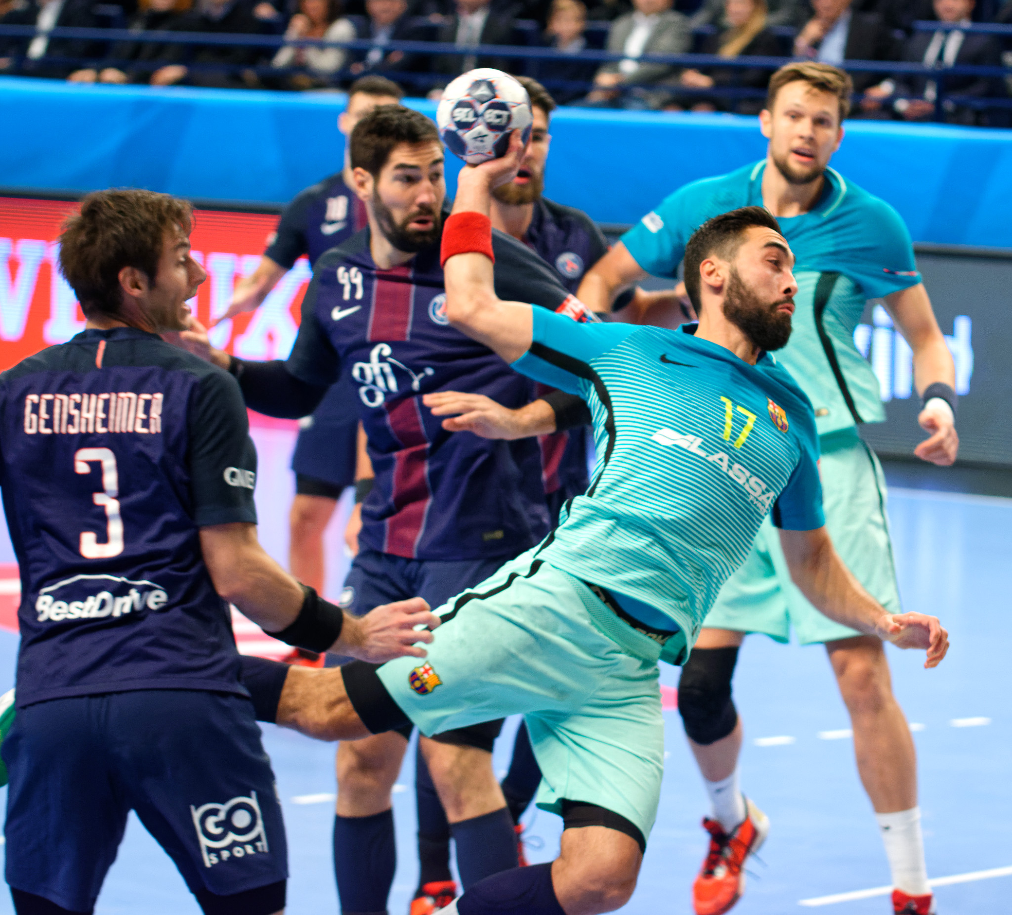 Rencontre de phase de groupe de la ligue des champions 2016-17 entre le PSG et le FC Barcelone. A Coubertin, le 12 novembre 2016.